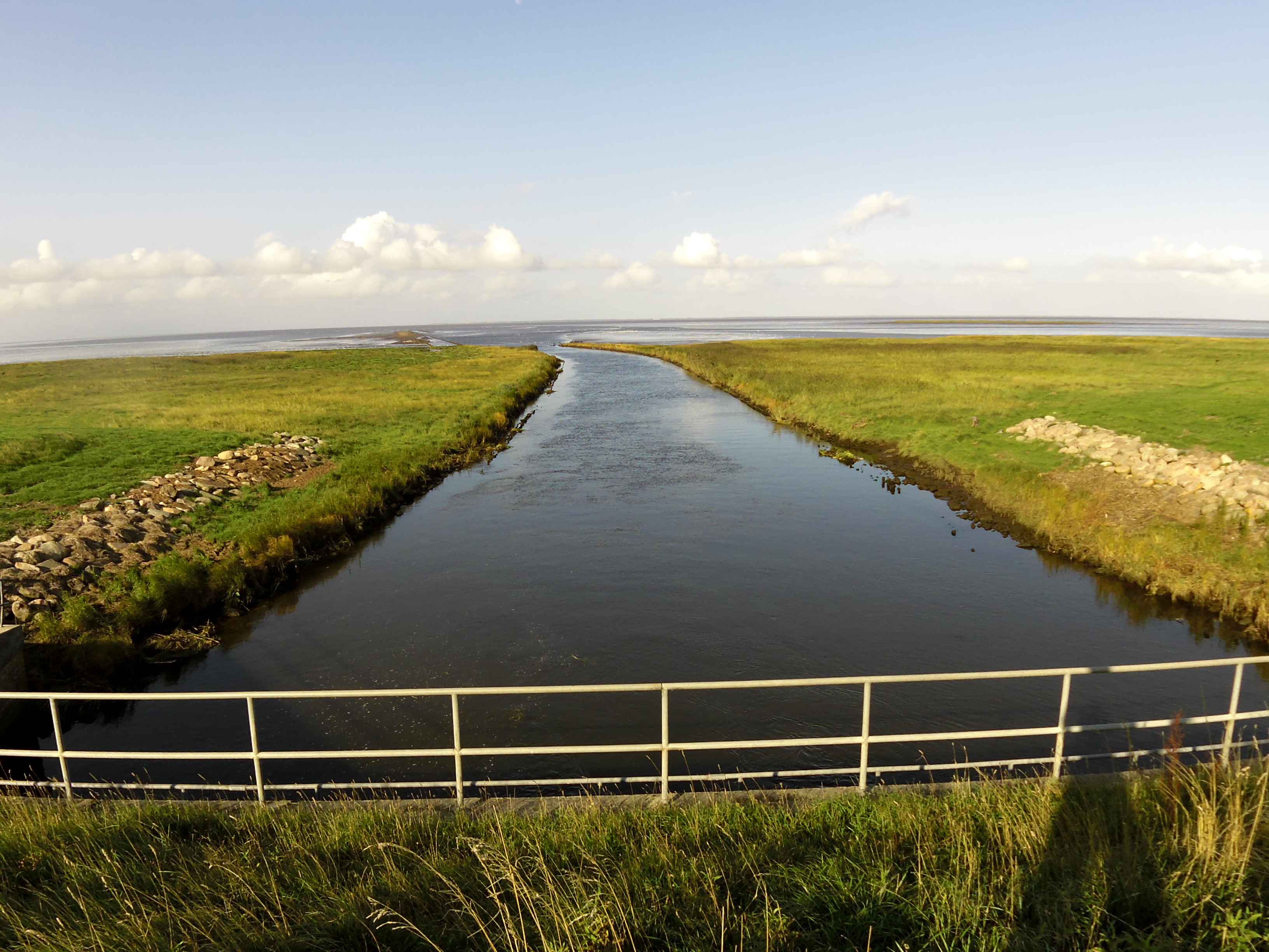 Kongeåens udløb i Vadehavet set fra digekronen